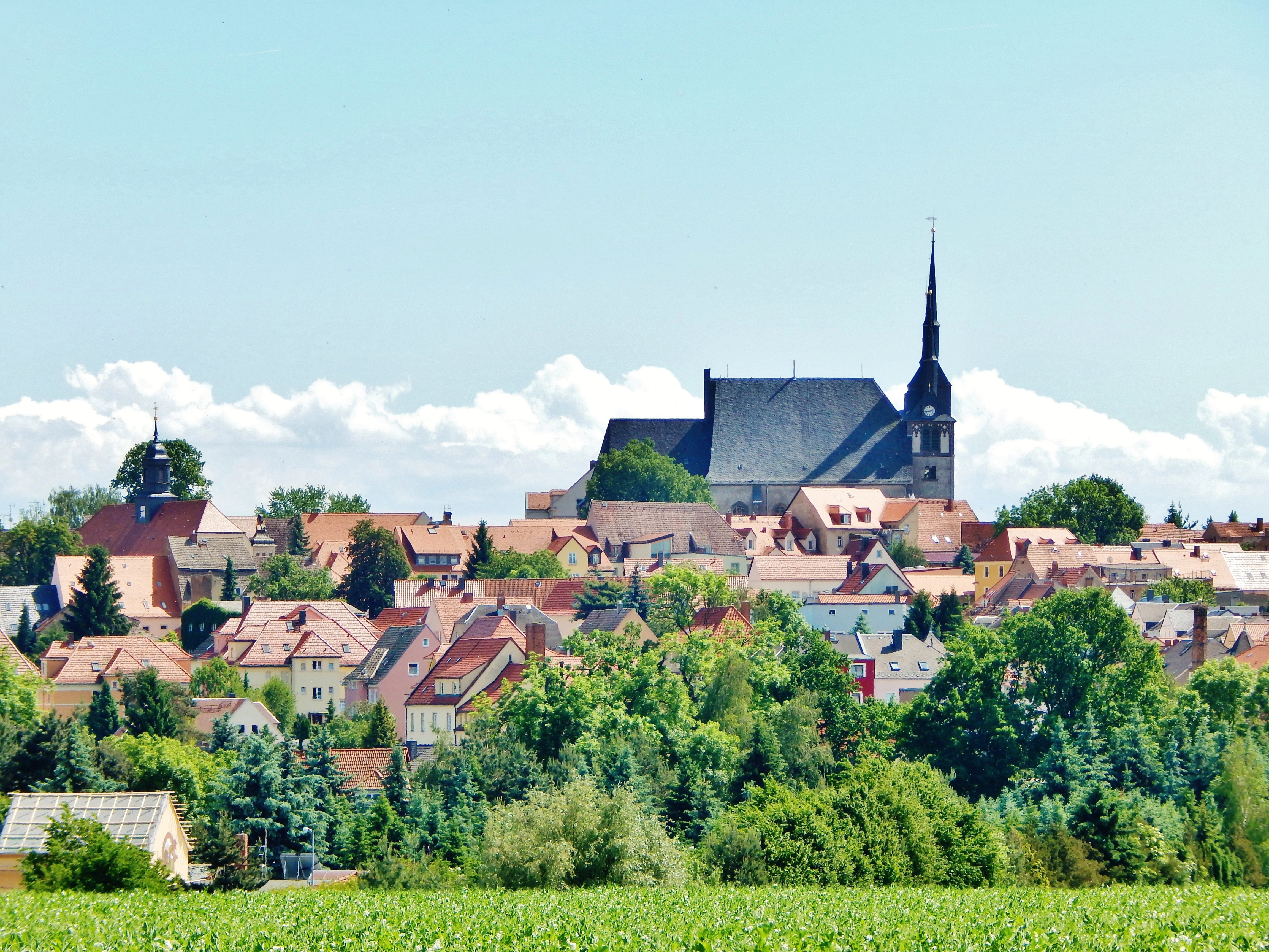 Aufnahme aus nördlicher Richtung,nahe Eisenbahnbrücke.